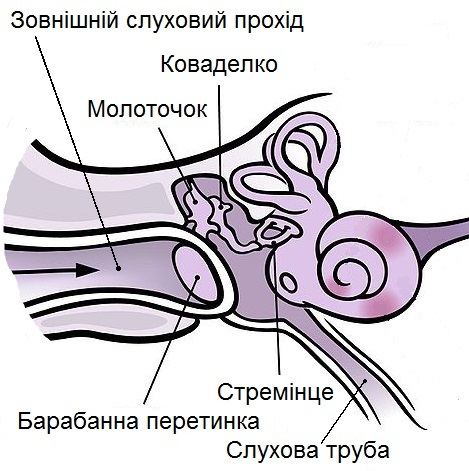 Елементи середнього вуха людини